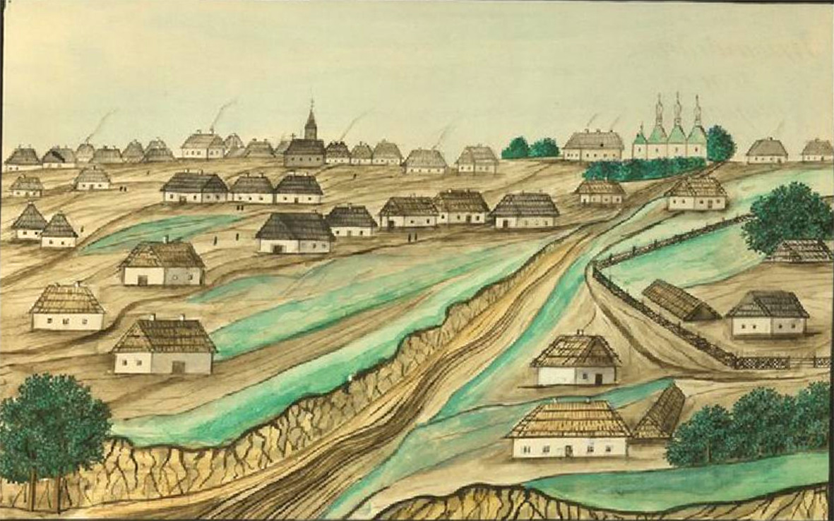 Фастів. Домінік П'єр де ля Фліз. «Медико-топографічний опис... Київської округи...». Київ, 1854. - с. 1146